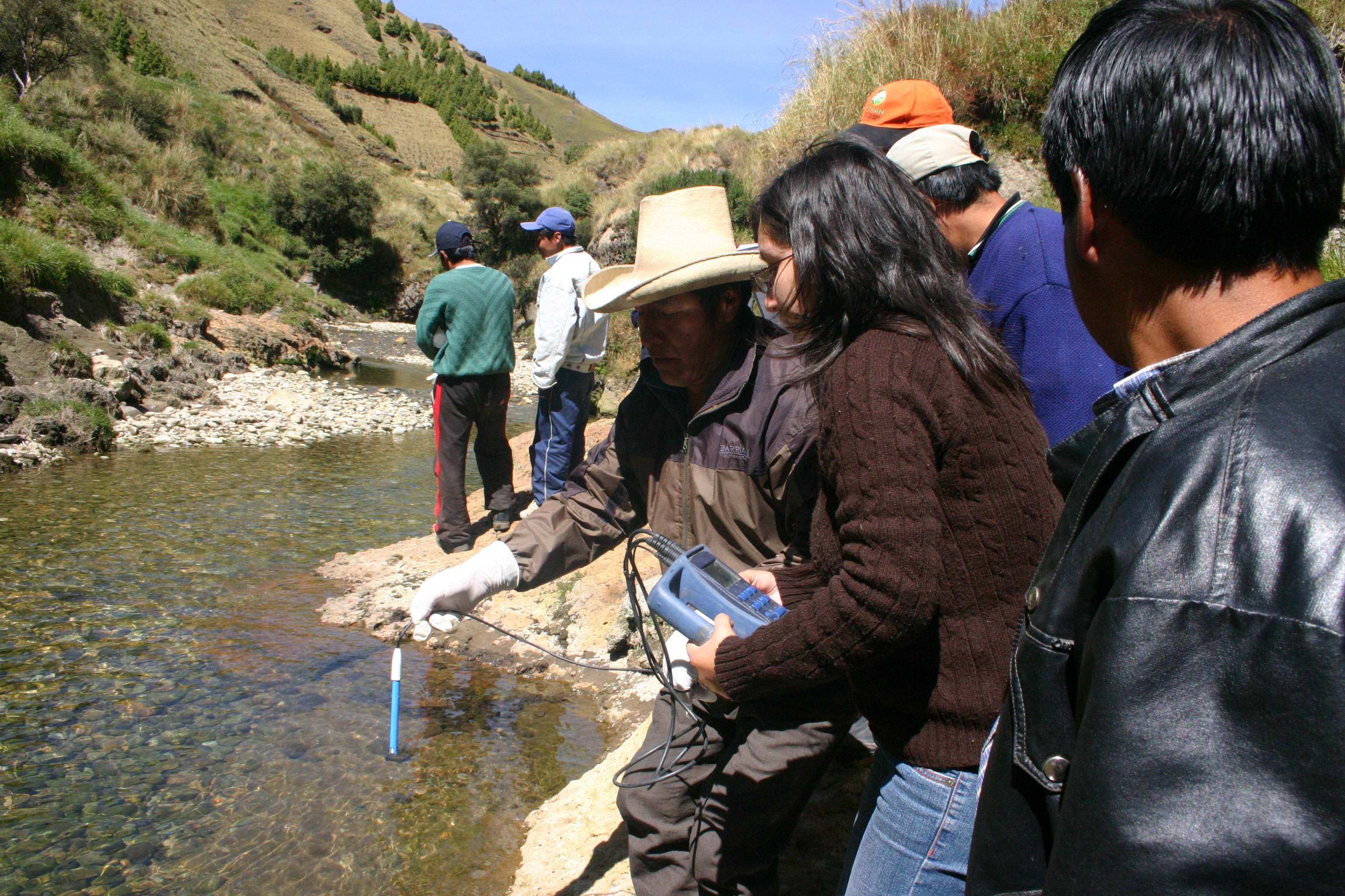 Monitoreo Participativo en Cajamarca